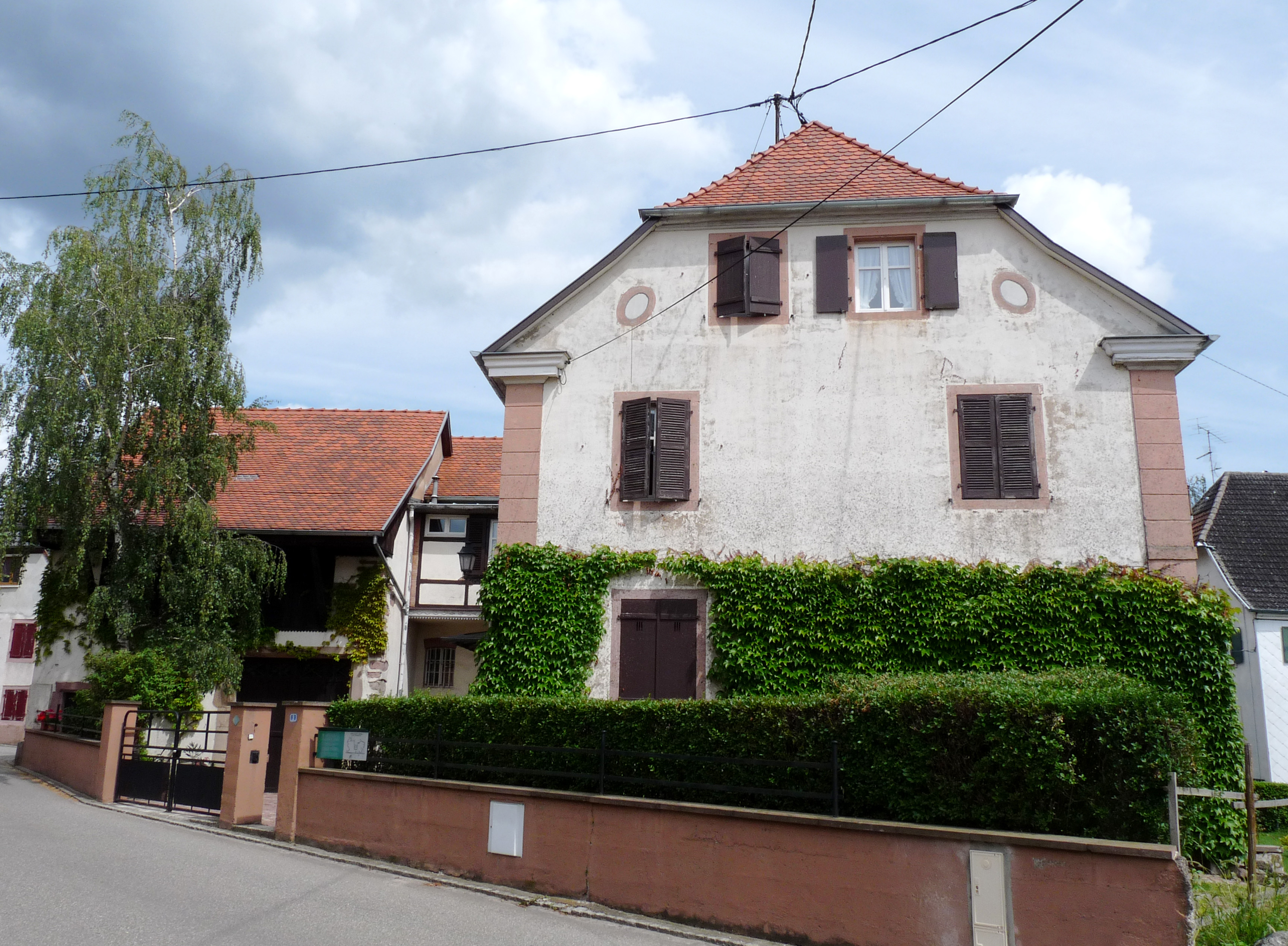 Gunsbach (Haut-Rhin) : ancien presbytère où vécut la famille d'Albert Schweitzer jusqu'à la mort du père en 1925.